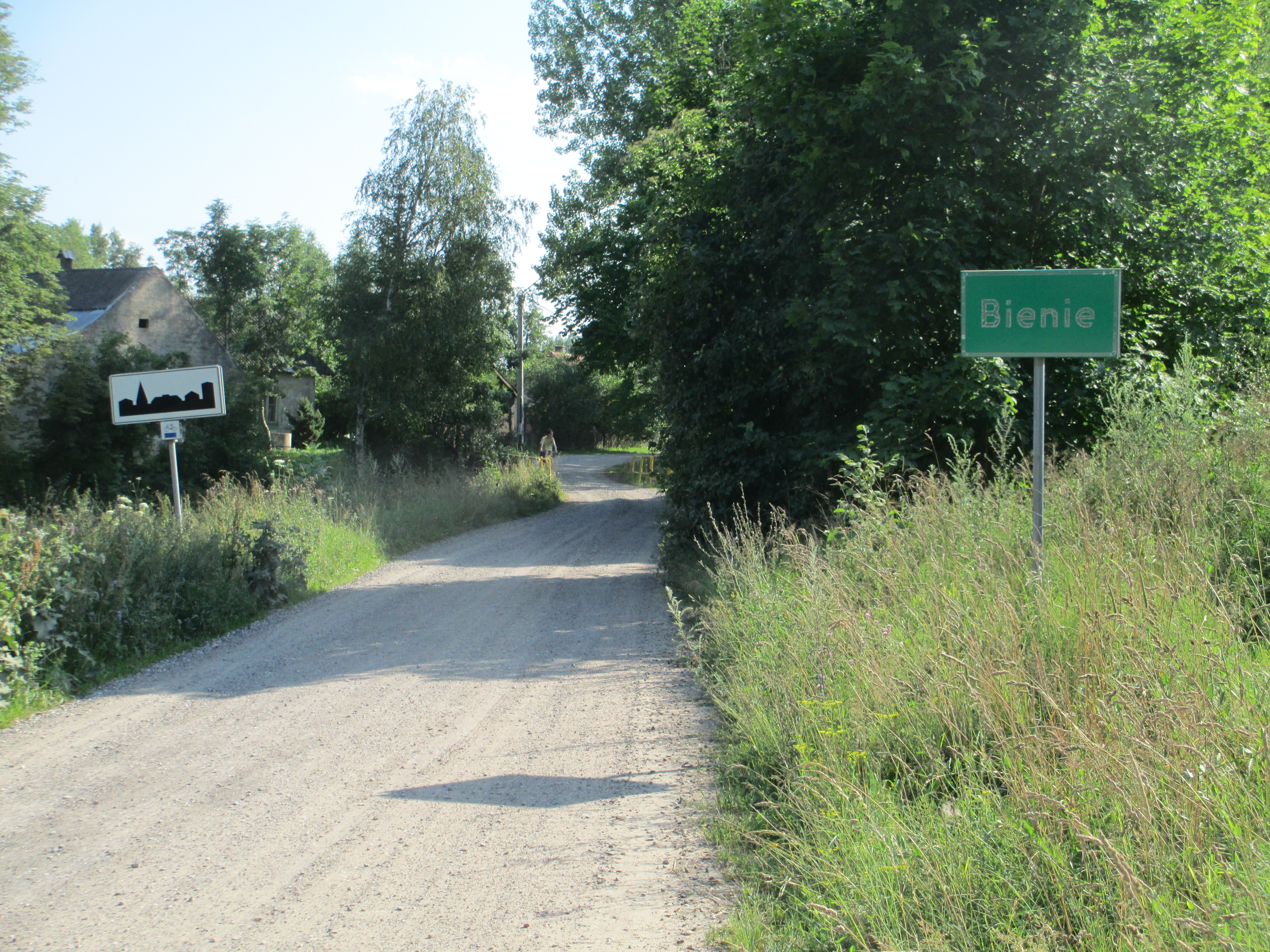 Bienie gm. Ełk